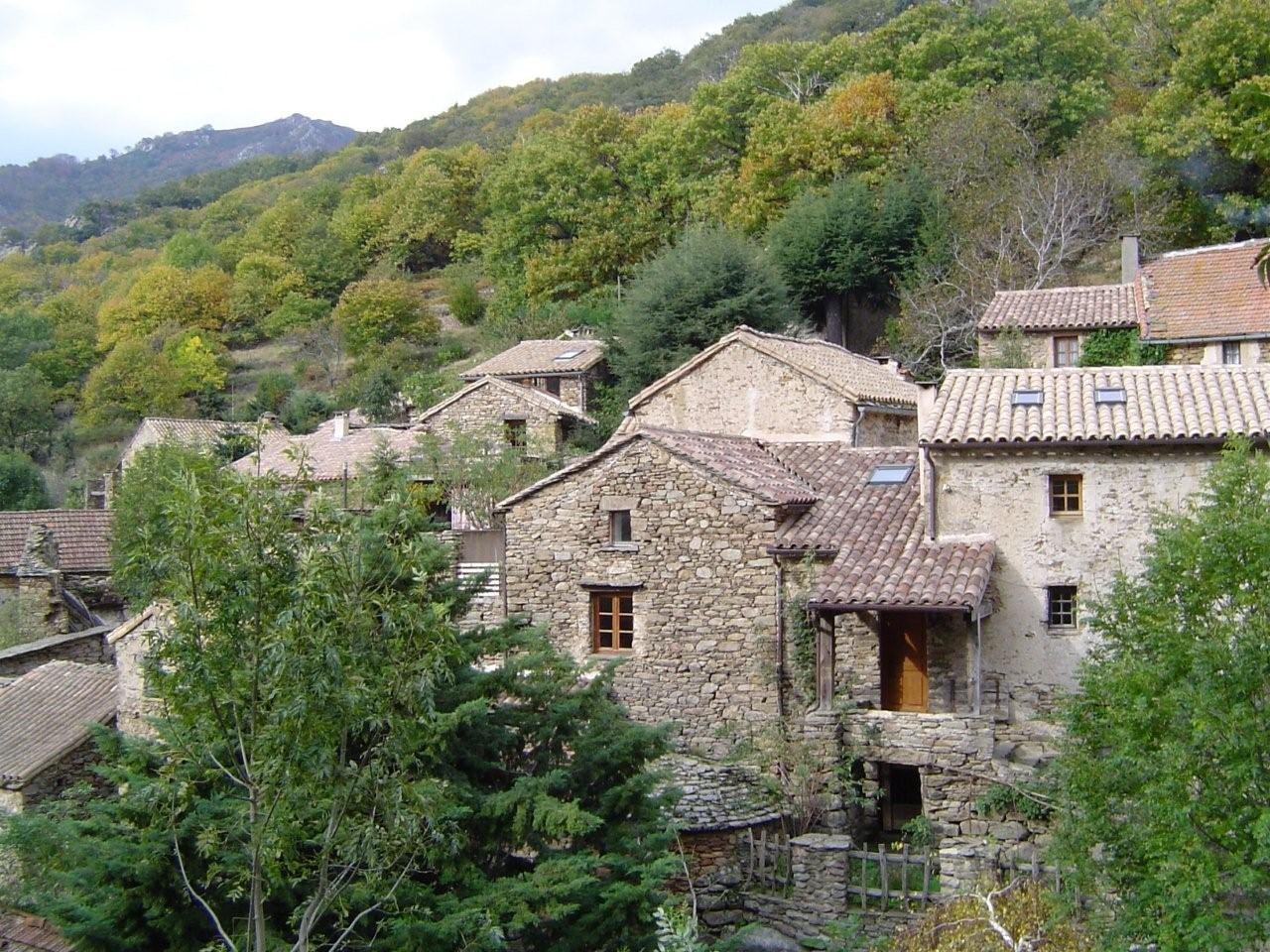 Mons (Hérault) - hameau de Bardou.